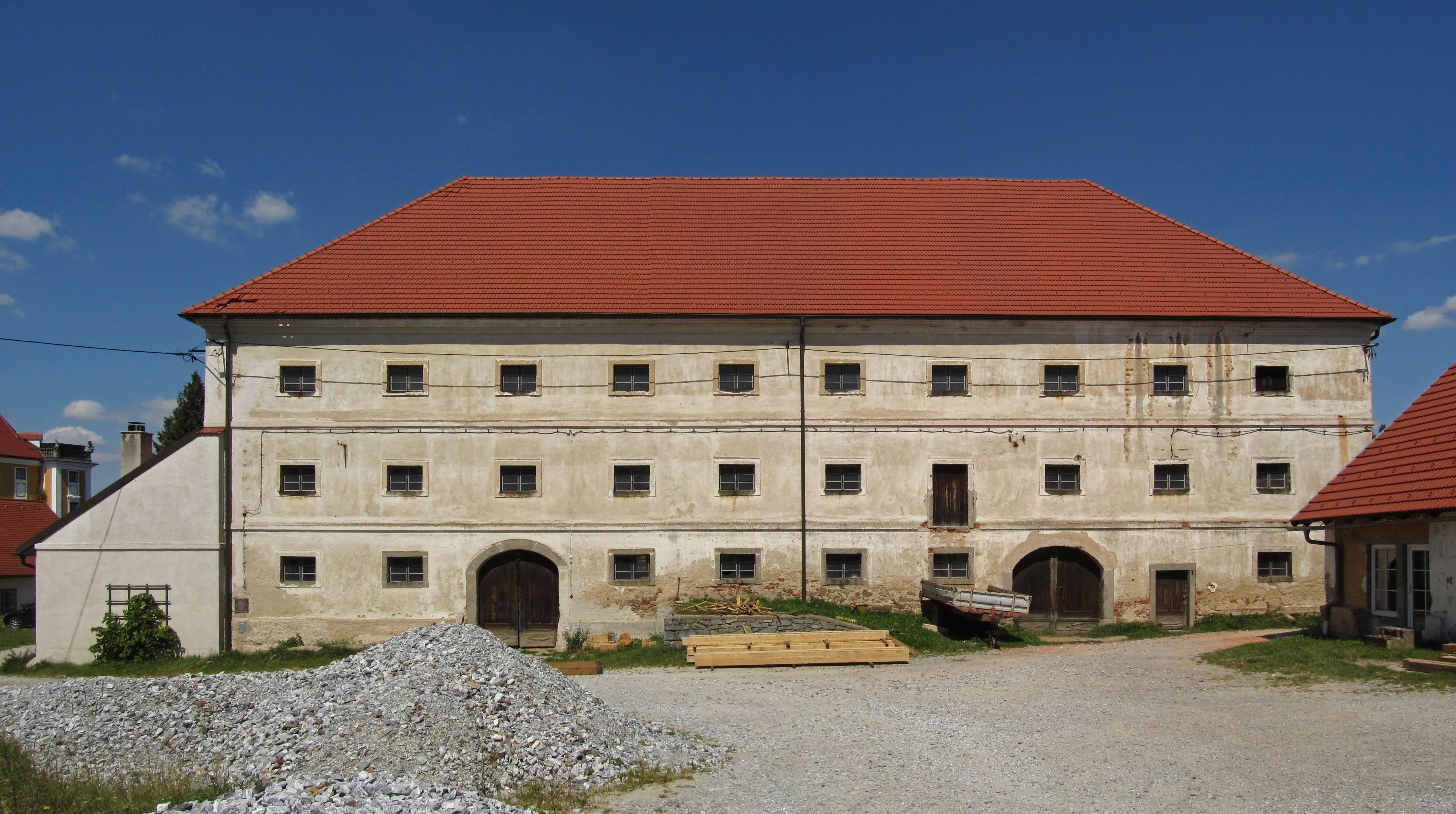 Der Wirtschaftshof des Schlosses stammt aus dem 18. Jahrhundert.